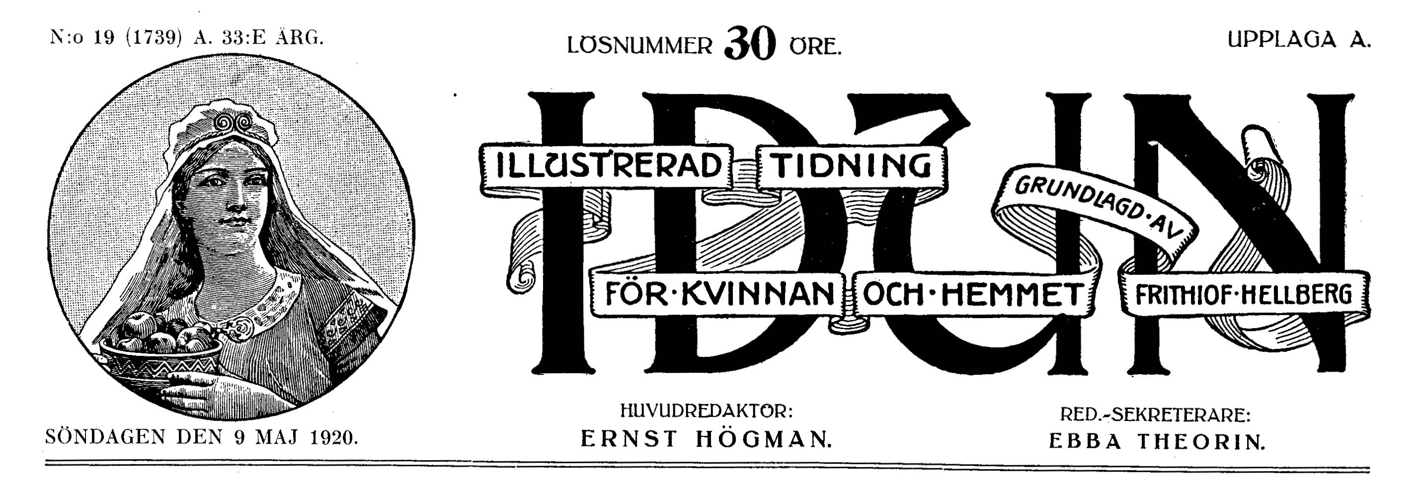 Tidningen Iduns sidhuvud från 1920.